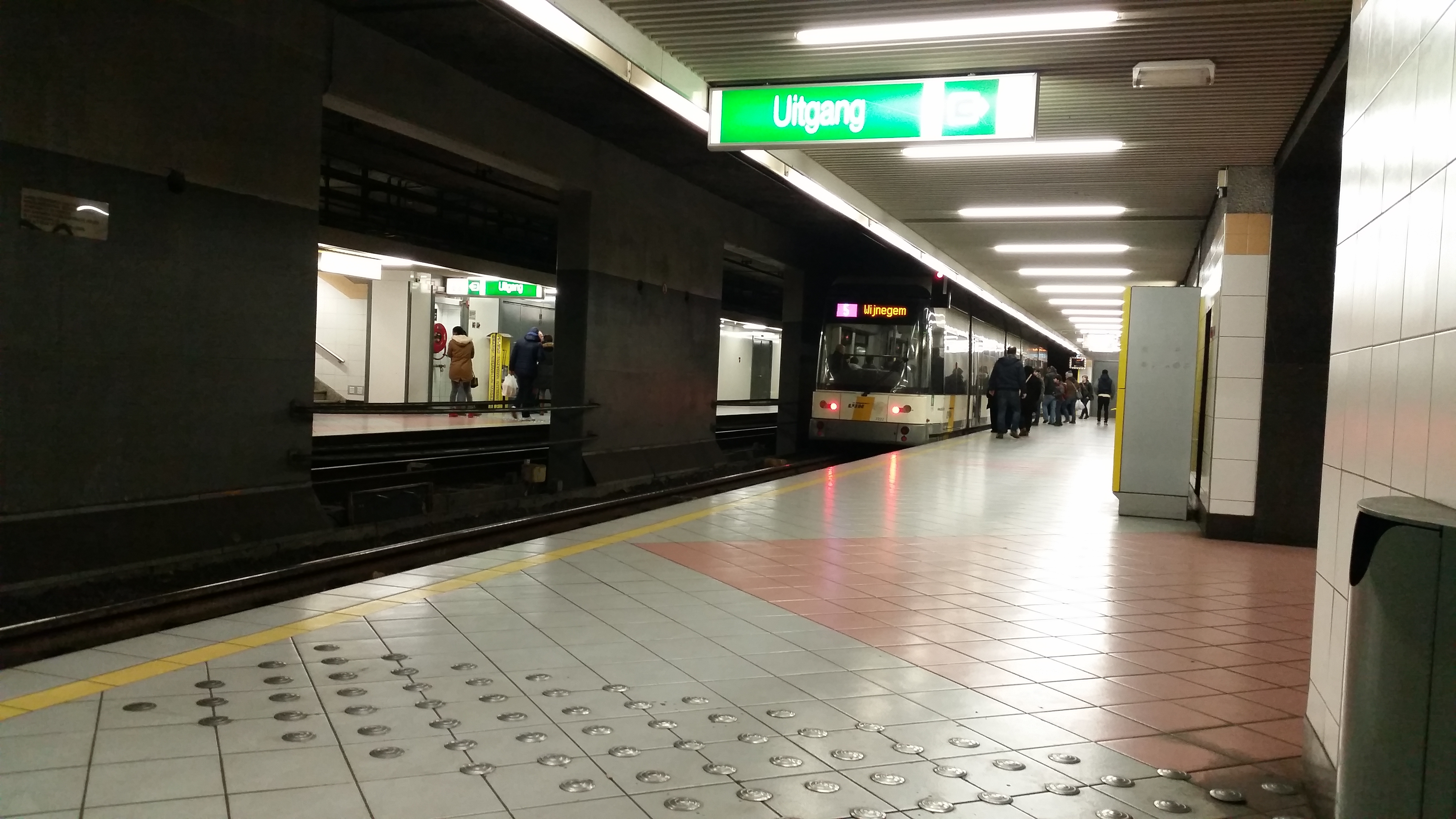 Tramvai al liniei 5 în stația de premetrou Elisabeth.